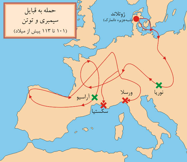 حمله به قبایل سیمبری و توتن